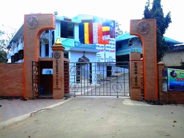 বনভান্তের বিশ্রামস্থল